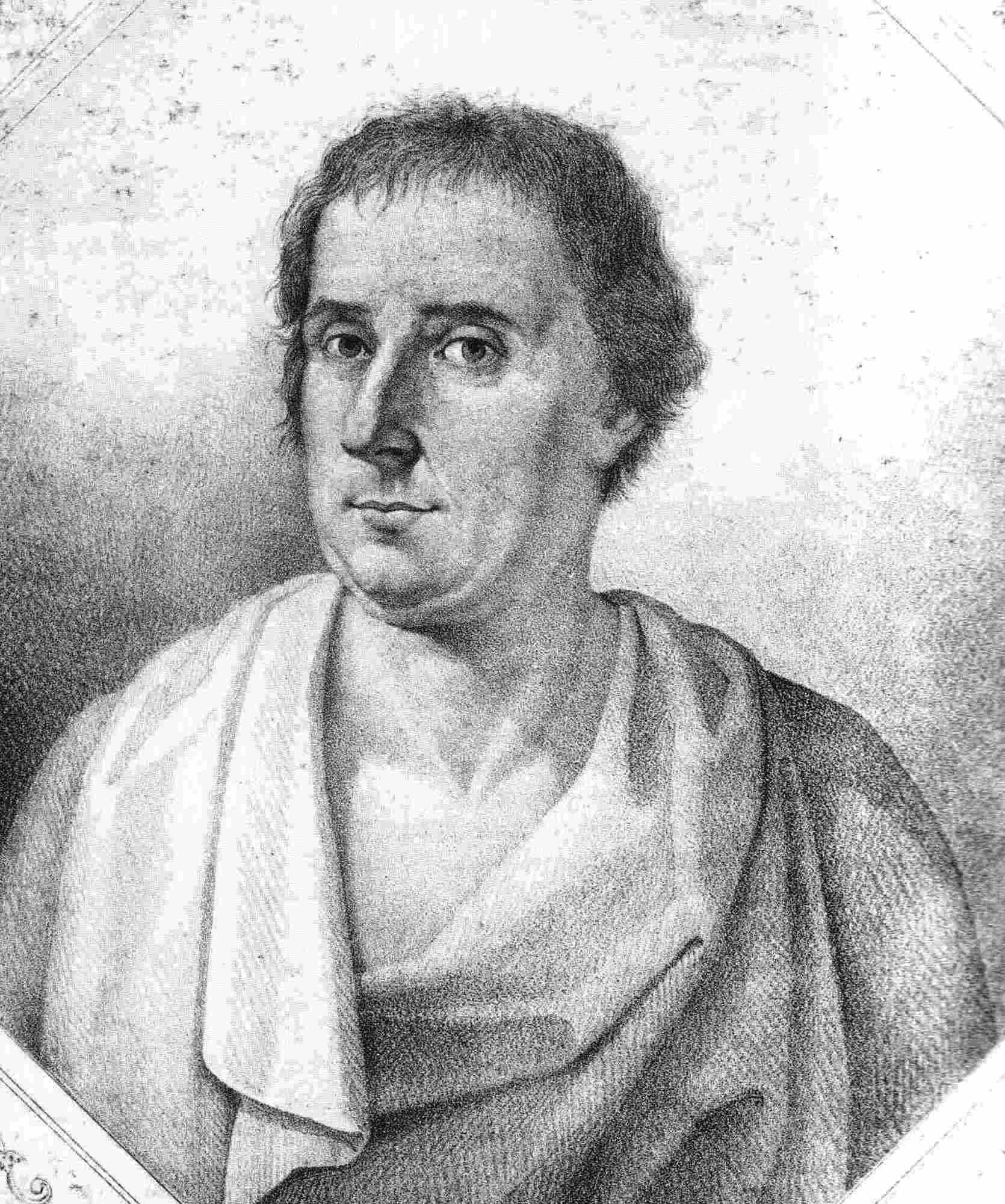 Angelo Mazza (1741-1817), poeta e scrittore parmigiano